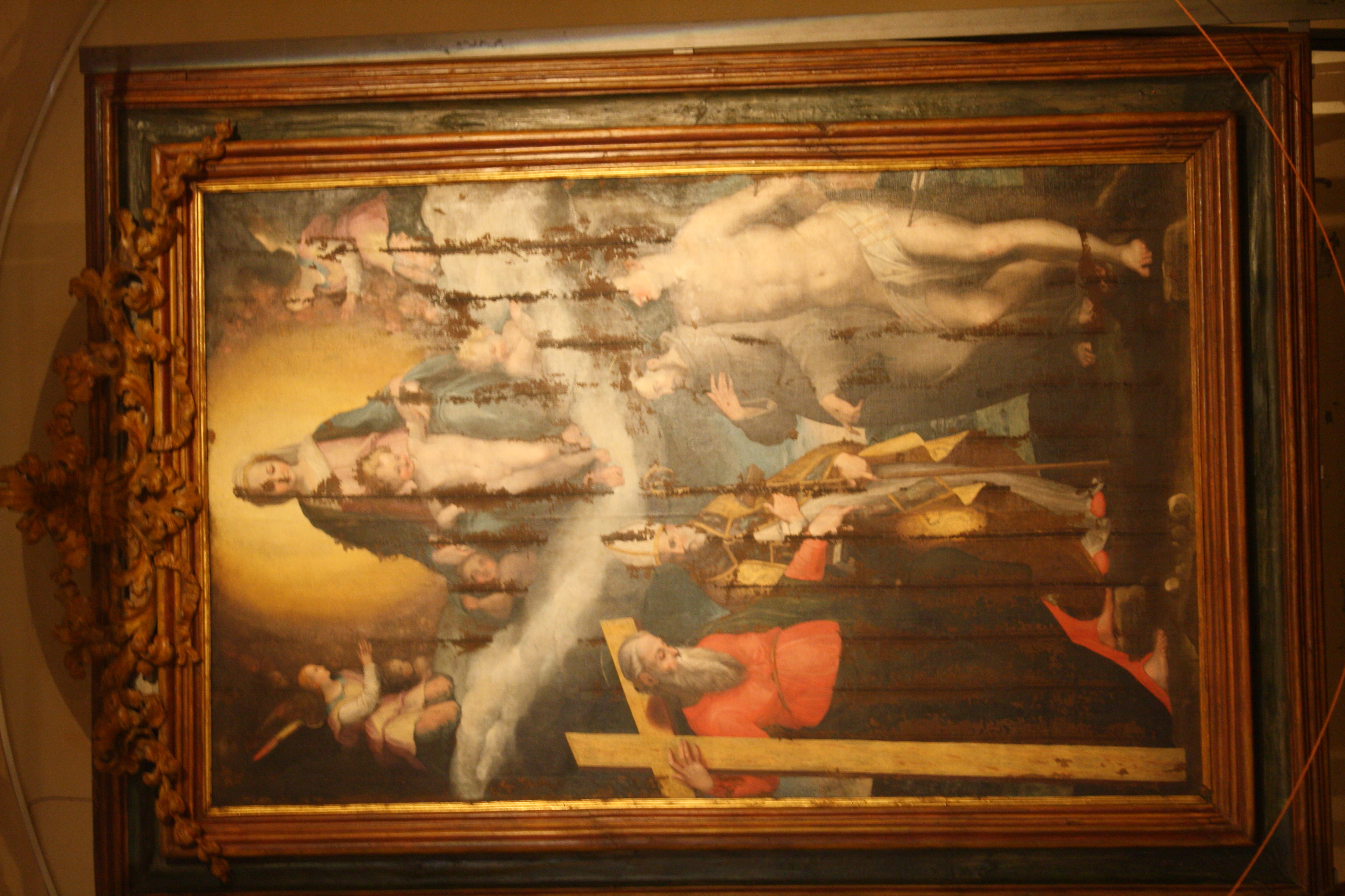 Madonna col Bambino in gloria tra Angeli e Santi : Niccolo Circignani